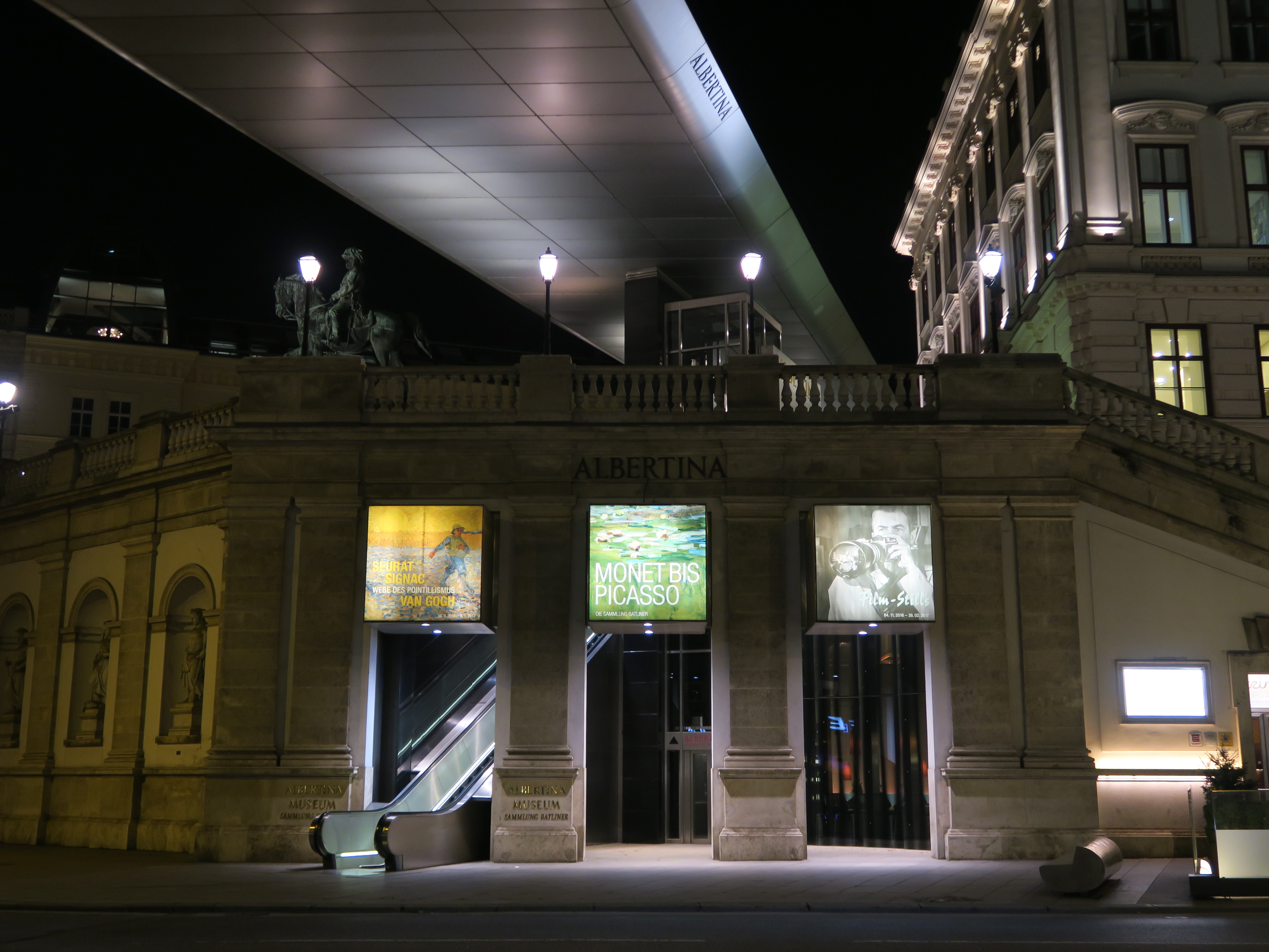 Gebäude der Albertina, in dem sich das Filmmuseum befindet